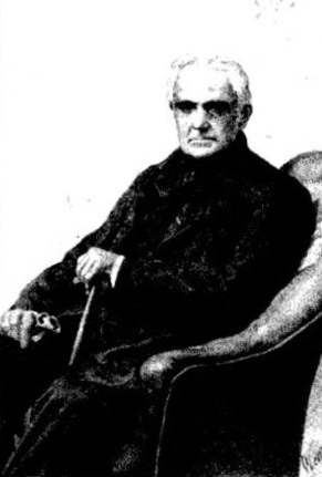 Ferdinando De Luca, geografo e matematico italiano